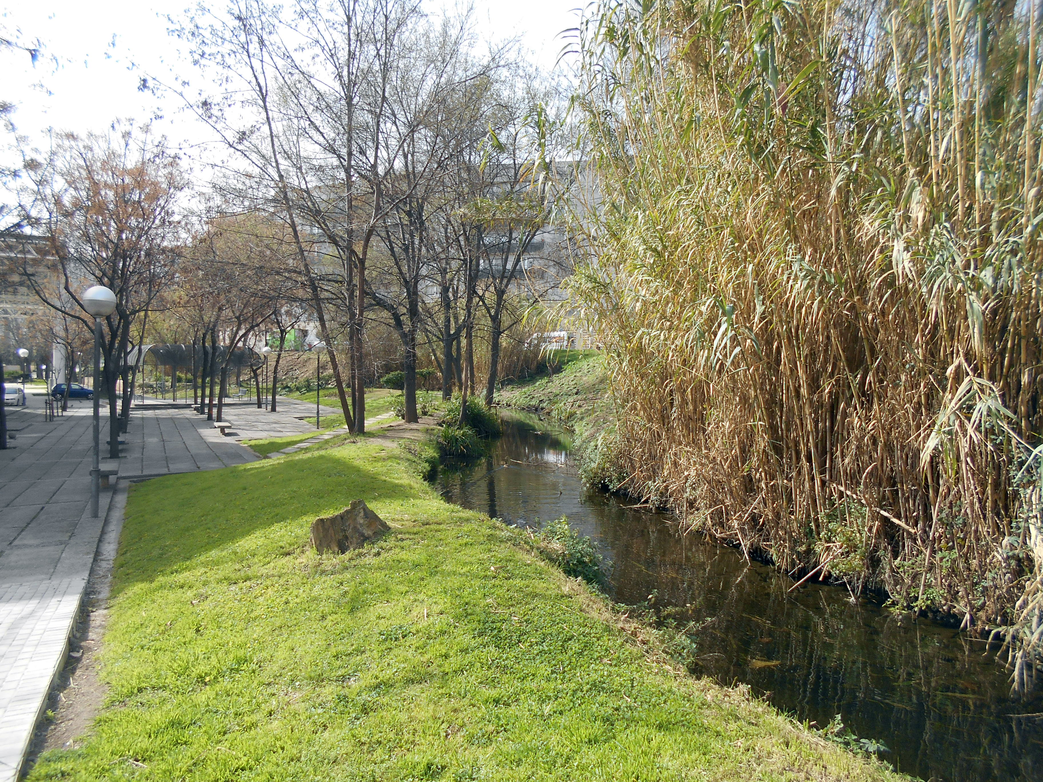 Tramo del Rec Comtal en la plaza del Primero de Mayo, Barcelona.